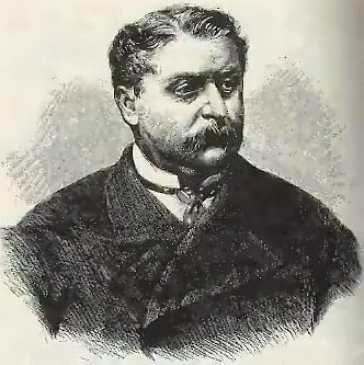 James Fisk (financier)